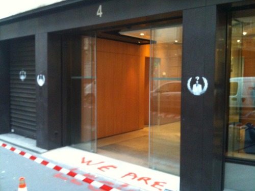 Le siège d’HADOPI à Paris taggué par Anonymous.